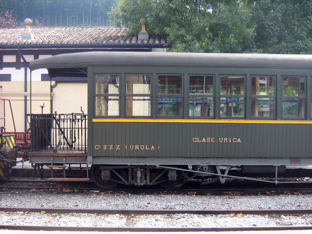 Tren antiguo expuesto en el Museo Vasco del Ferrocarril.